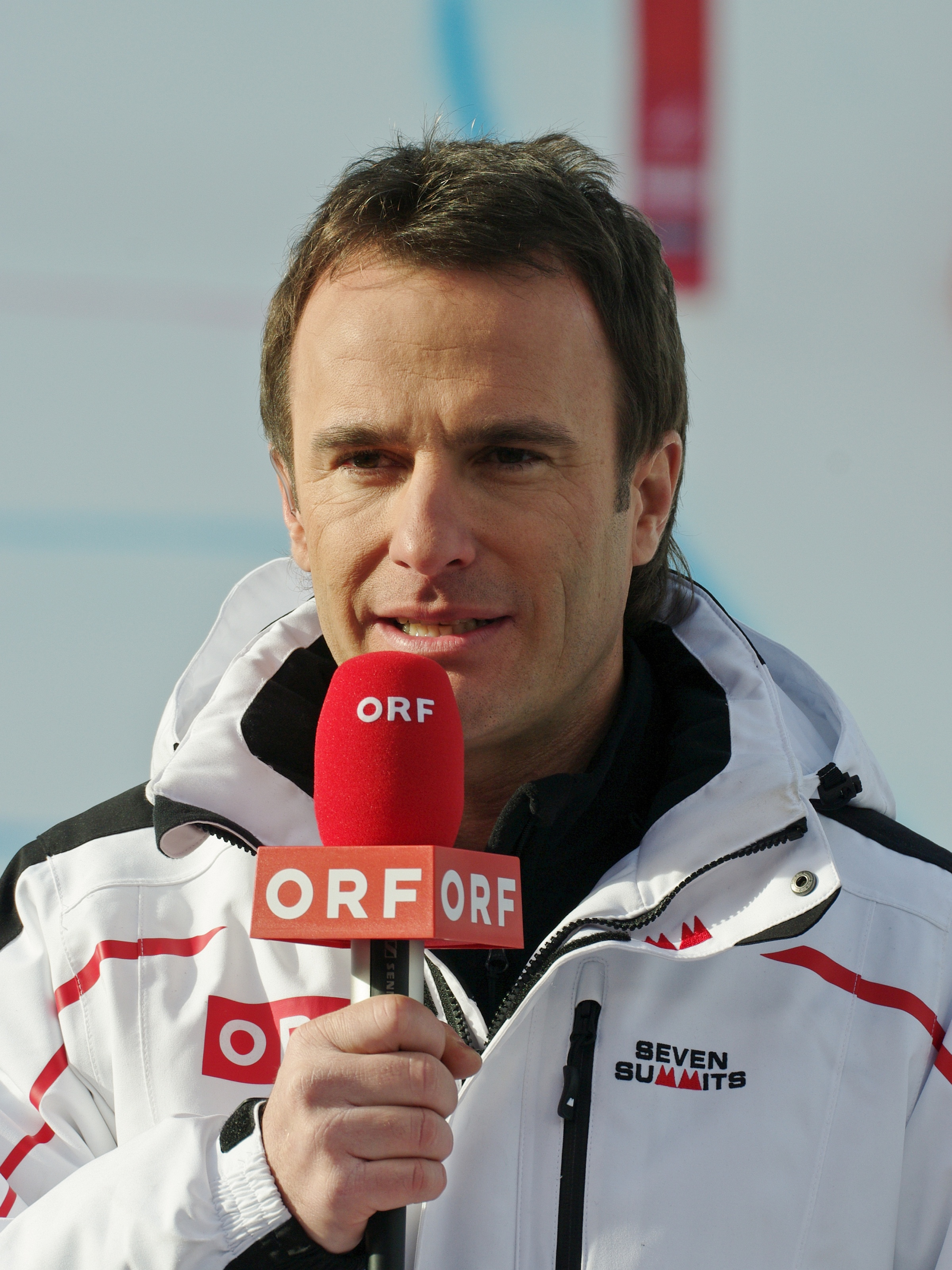 Der österreichische Fernsehkommentator Ernst Hausleitner berichtet für den ORF vom zweiten Training der Weltcupabfahrt in Altenmarkt-Zauchensee am 7. Januar 2011.